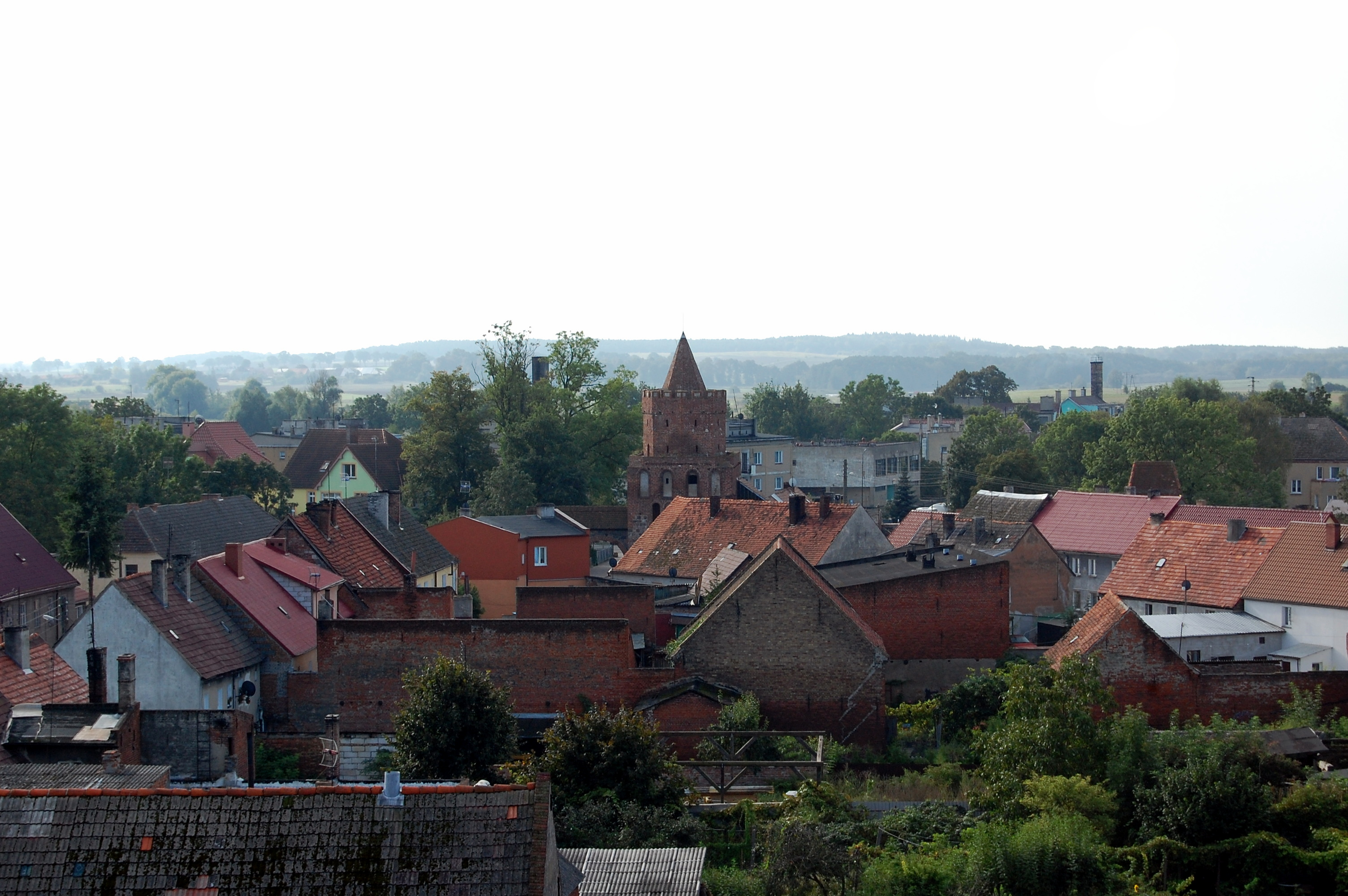 Teren Starego Miasta, Trzcińsko-Zdrój